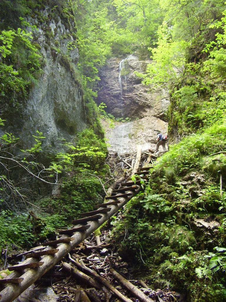 Sokolí dolina ve Slovenském Ráji